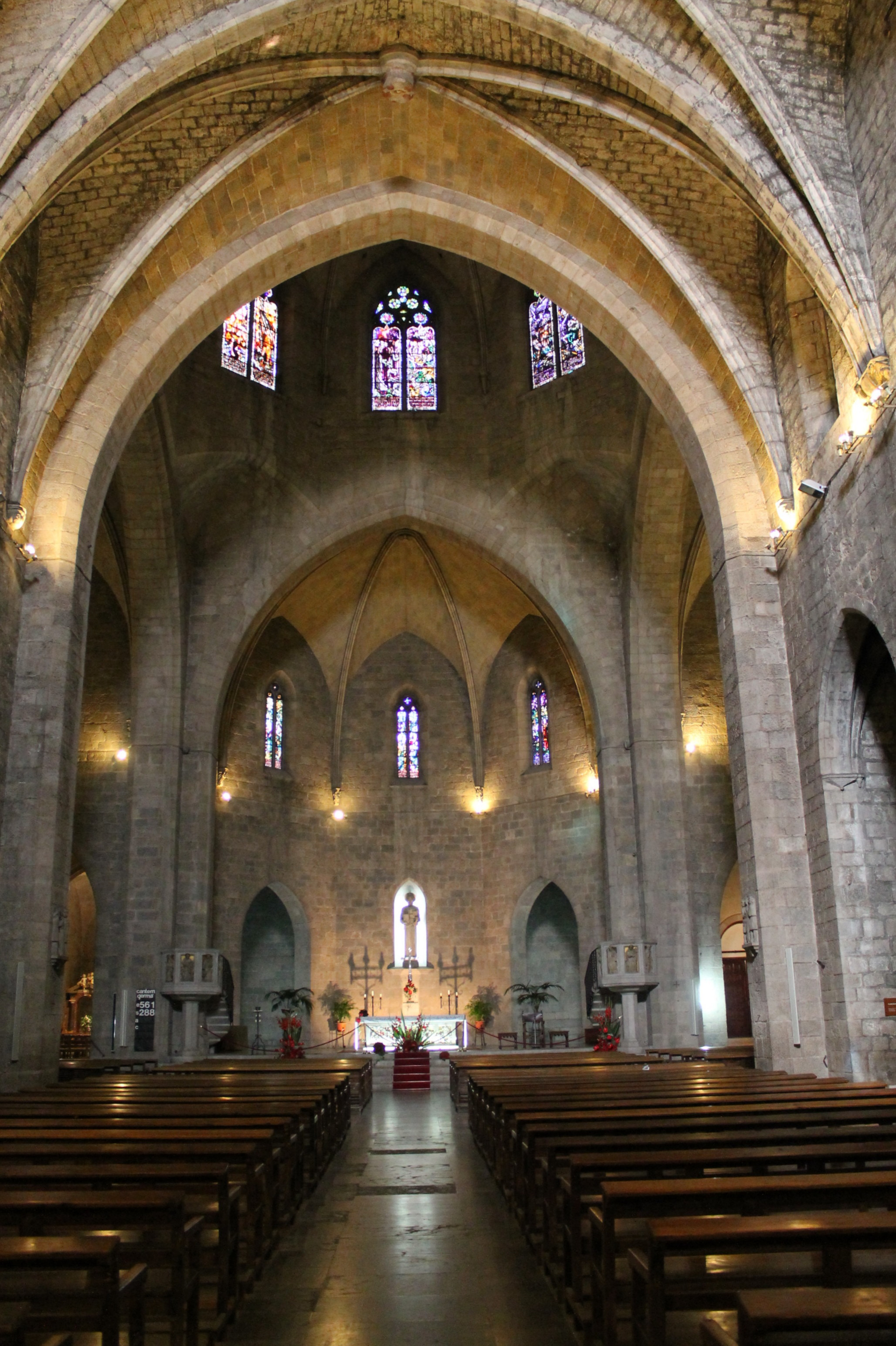 Eglise Sant Pere à FIGUERES (Catalunya)